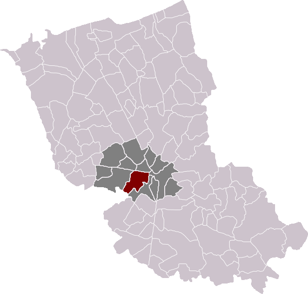 Locatie gemeente Zuidpene in arrondissement Duinkerke. Zelfgemaakt. Location of Zuytpeene municipality in the arrondissement of Dunkirk. Self made. Localisation de la commune de Zuytpeene dans l'arrondissement de Dunkerque. Fait moi-même.